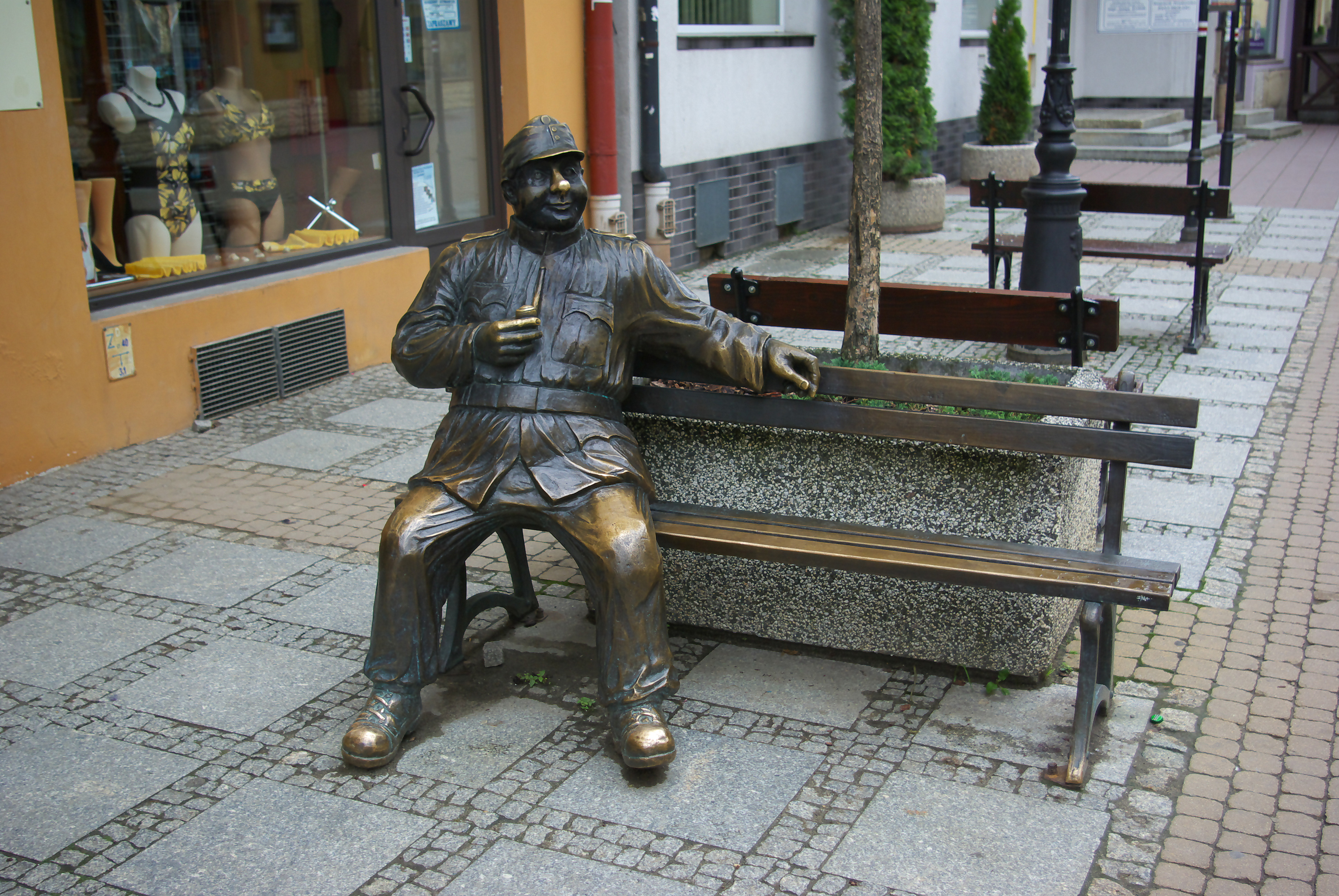 Pomnik-ławeczka Wojaka Szwejka w Sanoku